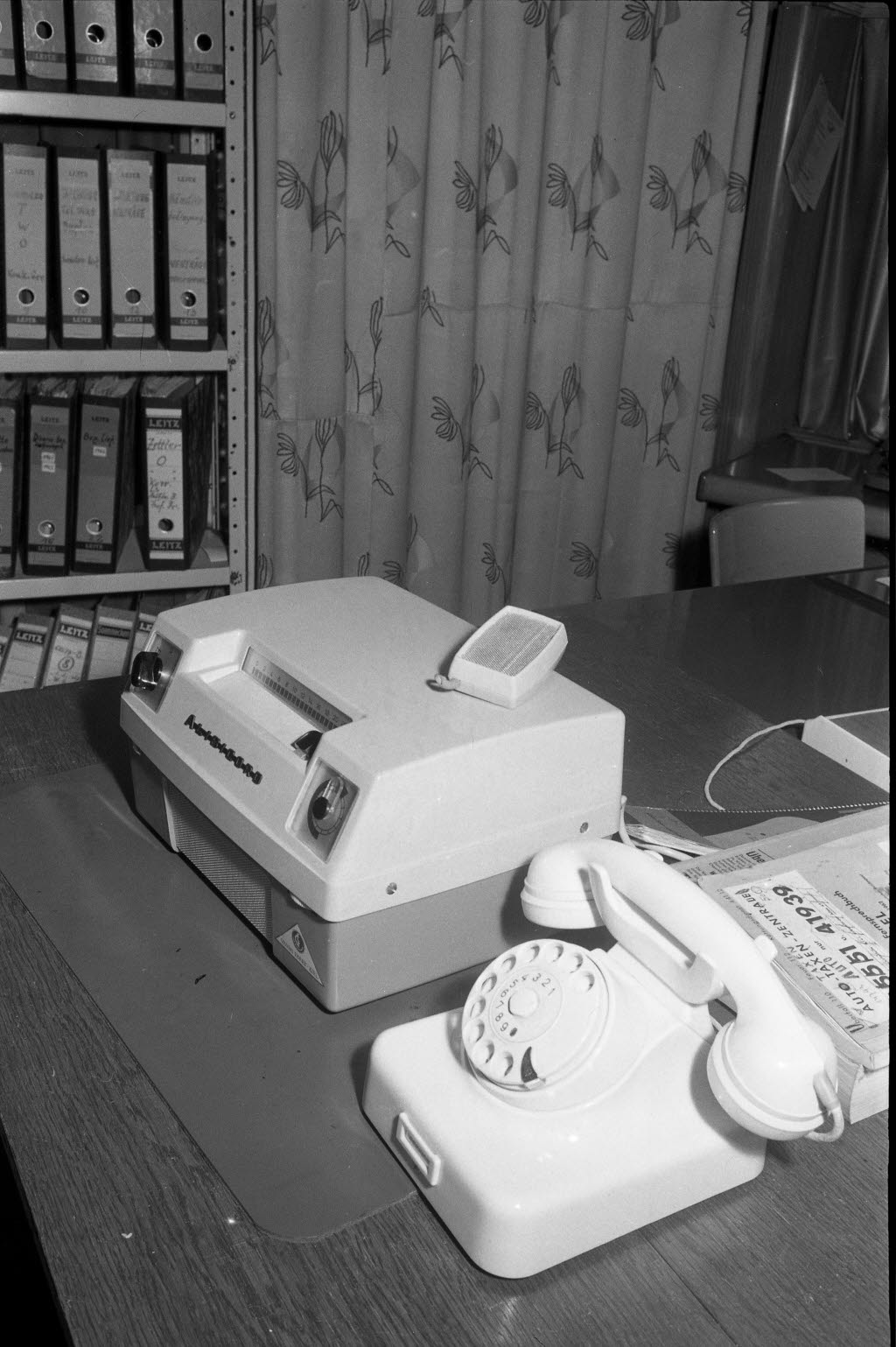 Erster in Deutschland von der Deutschen Bundespost zugelassener Anrufbeantworter.